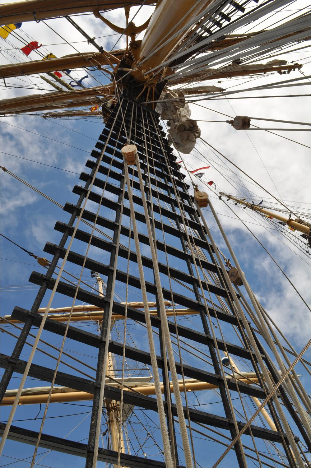 Rigging